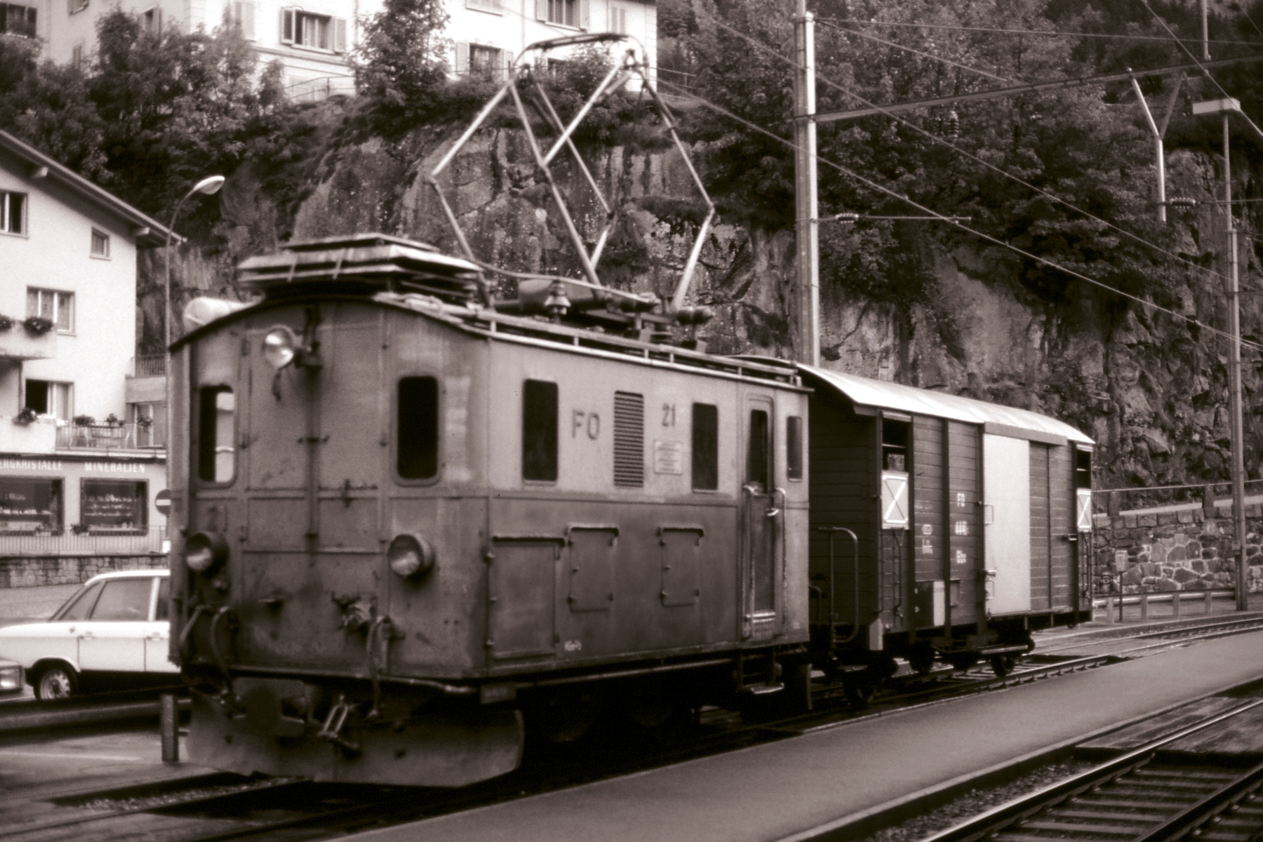 MGB FO HGe 2/2 der Schöllenenbahn in Göschenen, Schweiz